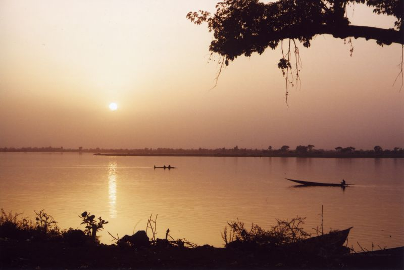 Sunset in Segou, Mali, Niger River